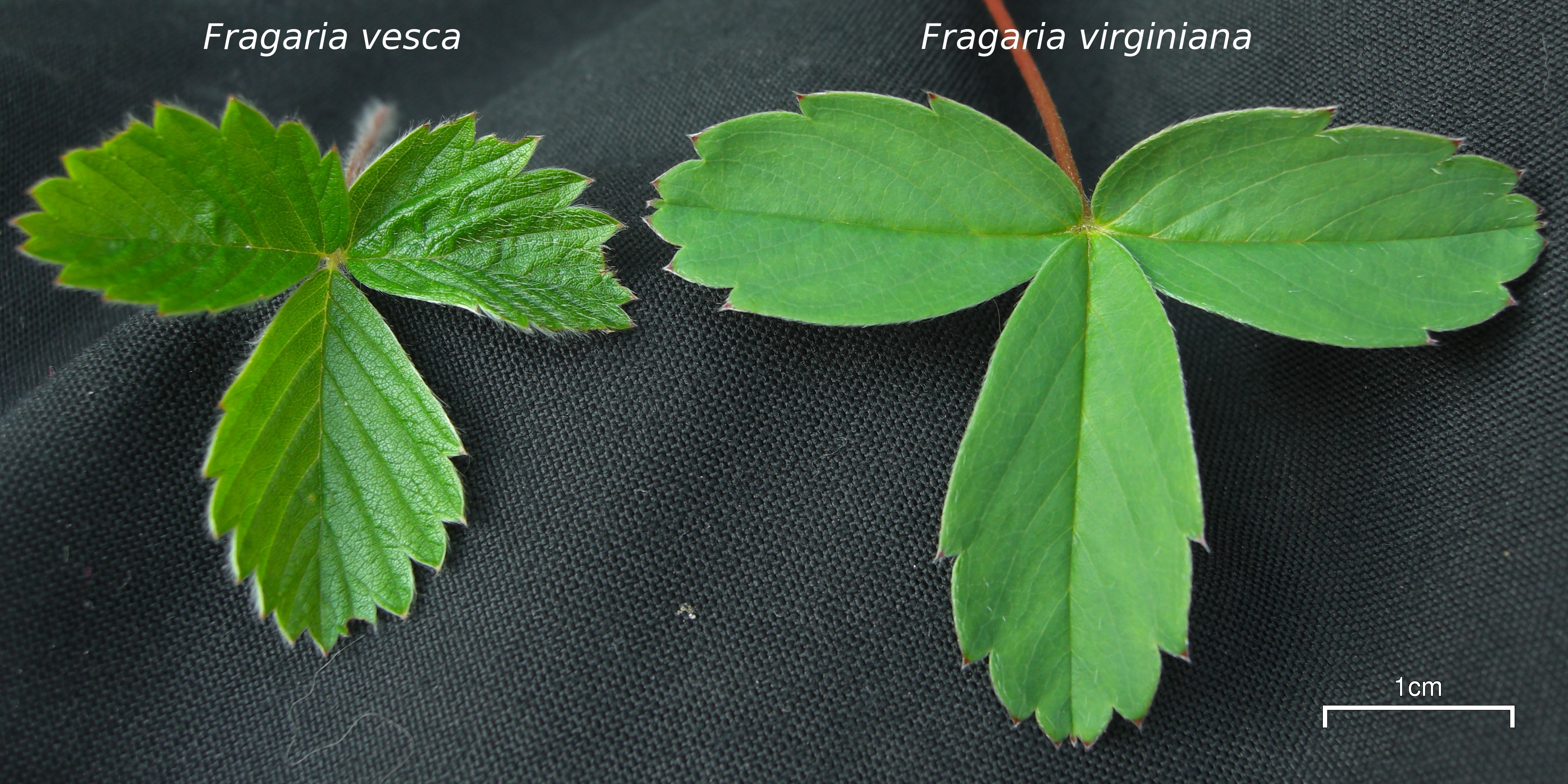 Fragaria vesca var. crinita Fragaria virginiana var. glauca 20090514.8 and 9 Wells Gray Provincial Park, BC